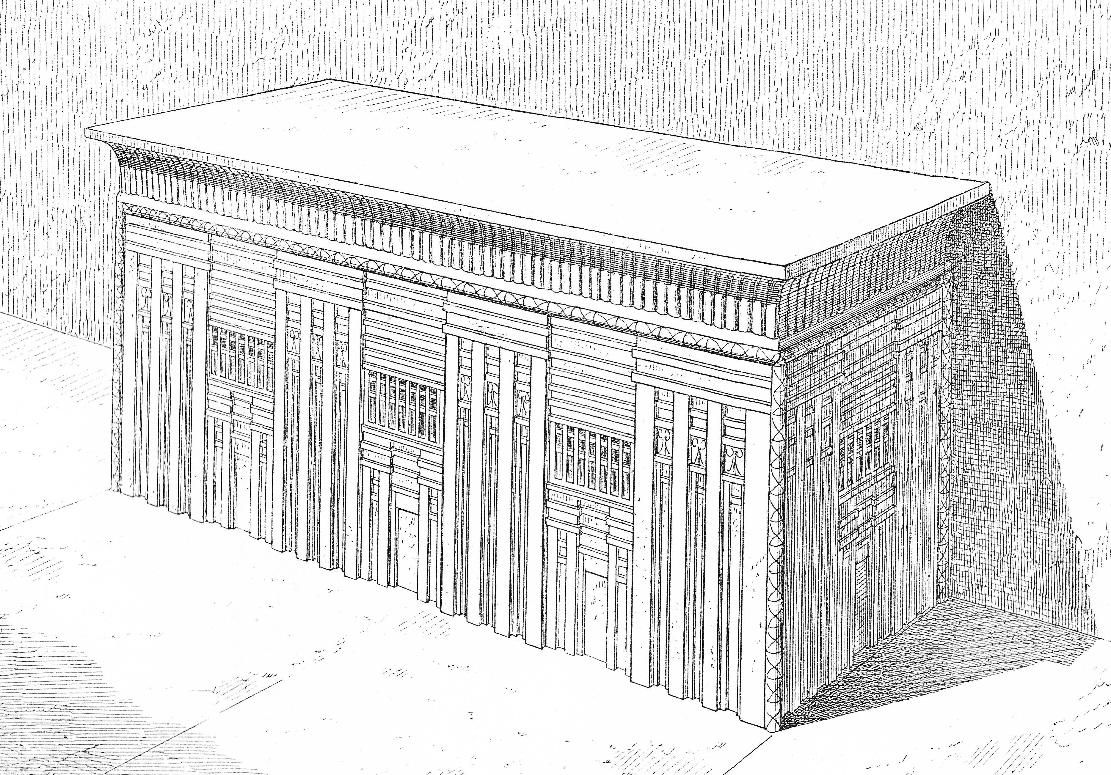 Vue perspective du sarcophage de Mykérinos d'après le géométral de Perring